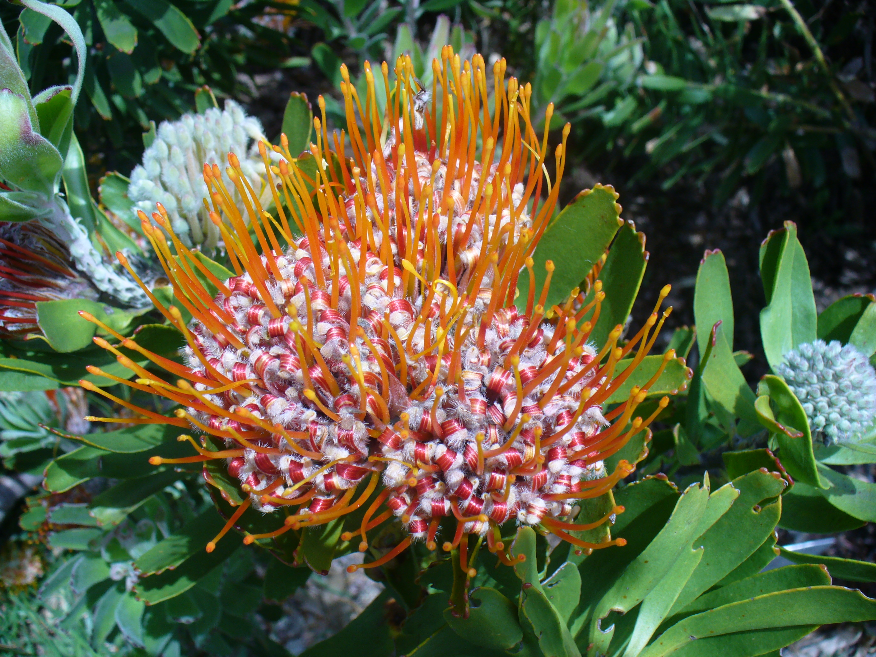 Kirstenbosch 2006 Andrew Massyn